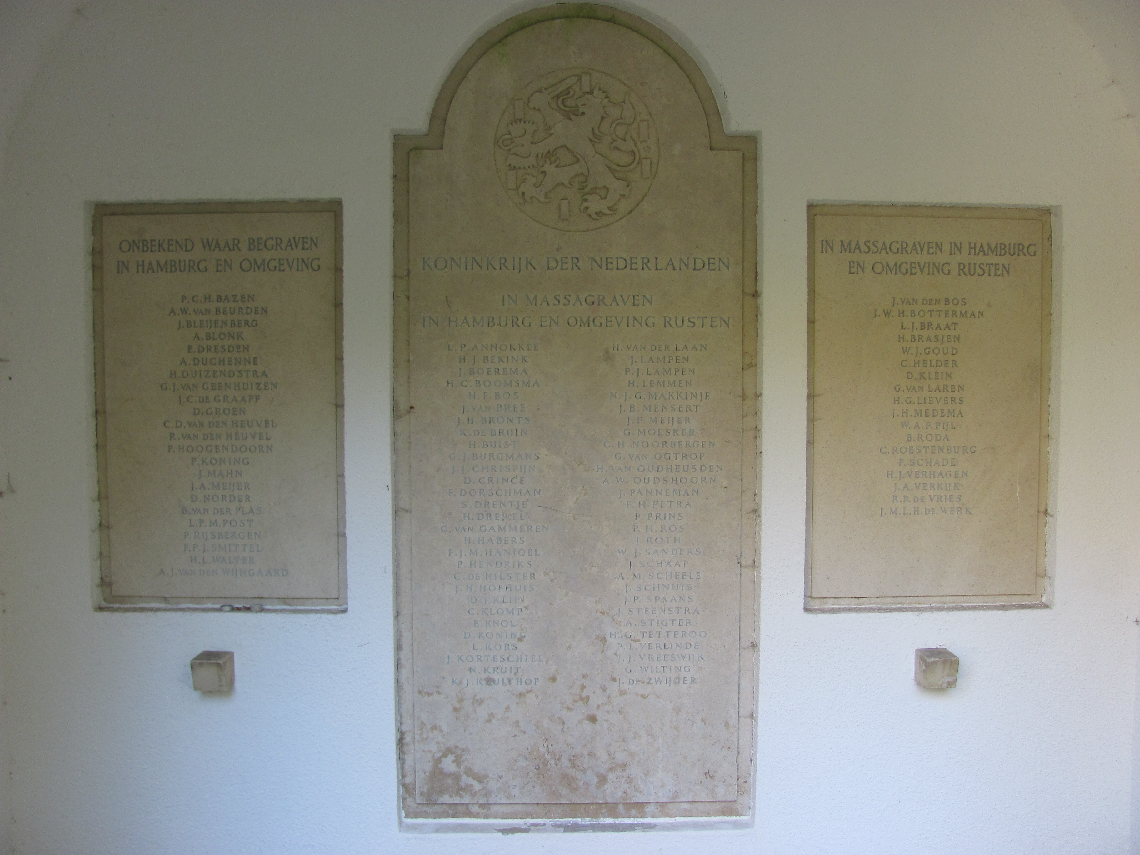 Tafeln mit den Namen von 99 Kriegsopfern, deren Gräber in Hamburg nicht mehr auffindbar sind, in der Ehrenhalle auf dem Niederländischen Ehrenfeld auf dem Friedhof Ohlsdorf